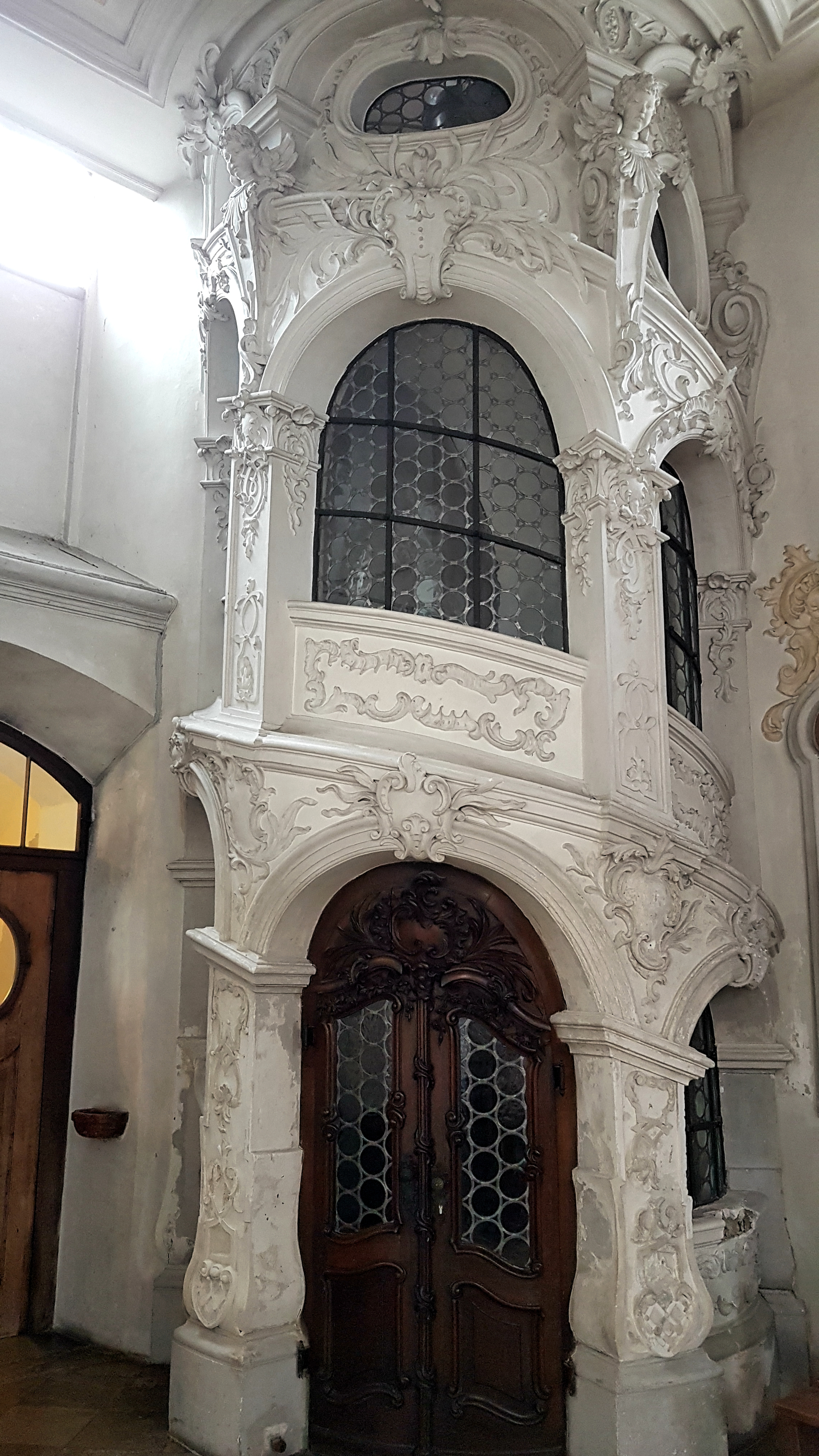 München, Hl. Geist, Wendeltreppe zur Empore.